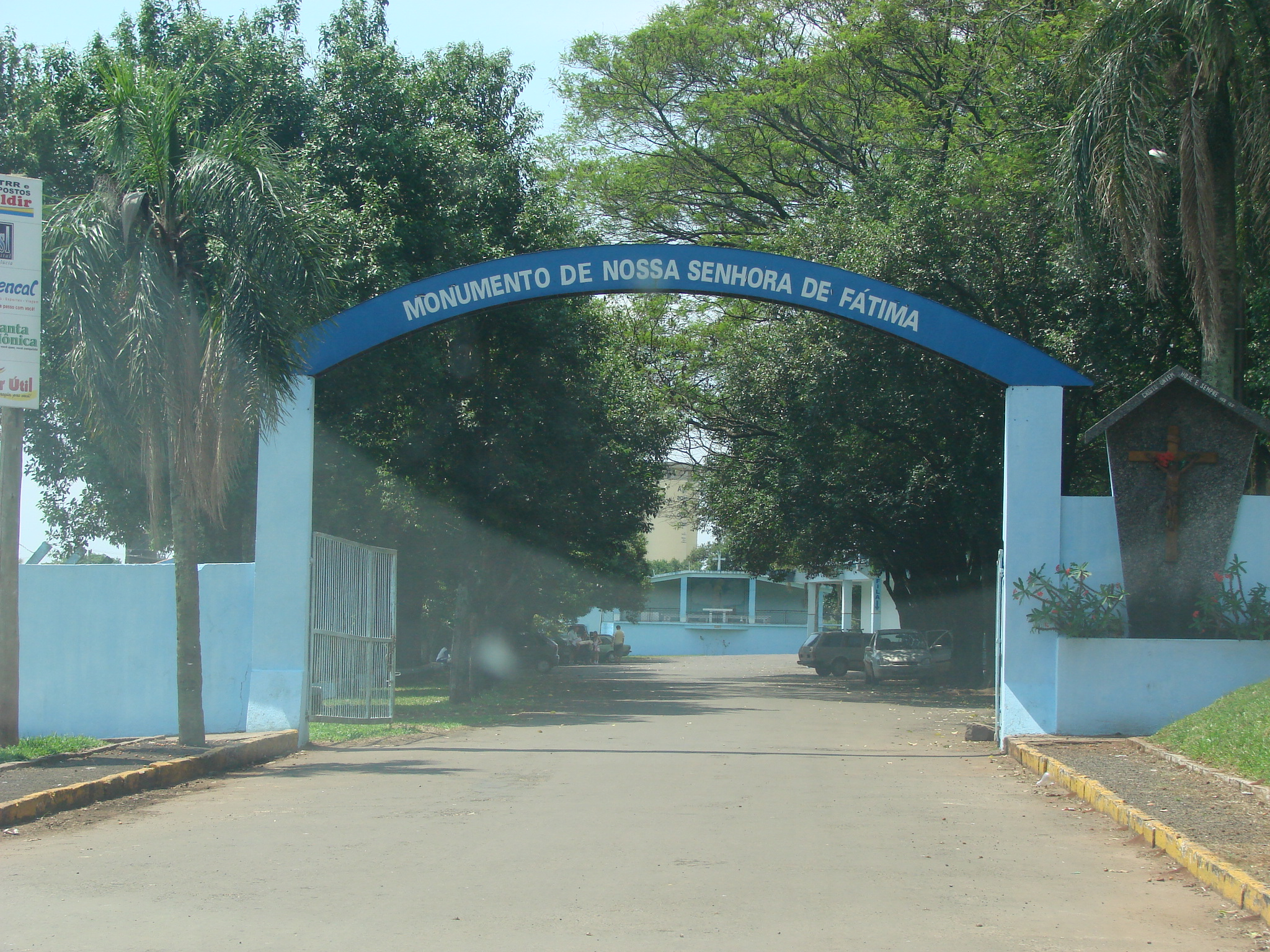 Entrada do Monumento de Nossa Senhora de Fátima, em Cruz Alta.